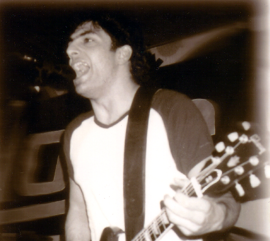 Emirze of Rinderwahnsinn live @ Ganderkese